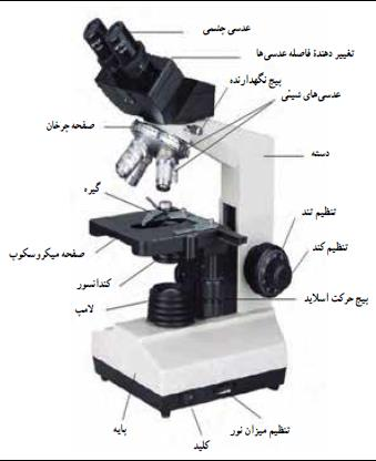 میکروسکوپ